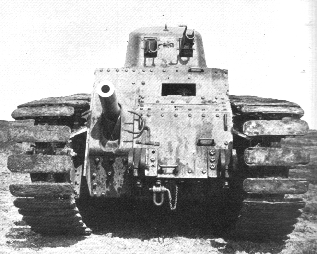 Elektronische reproductie van foto van prototype SRA-tank